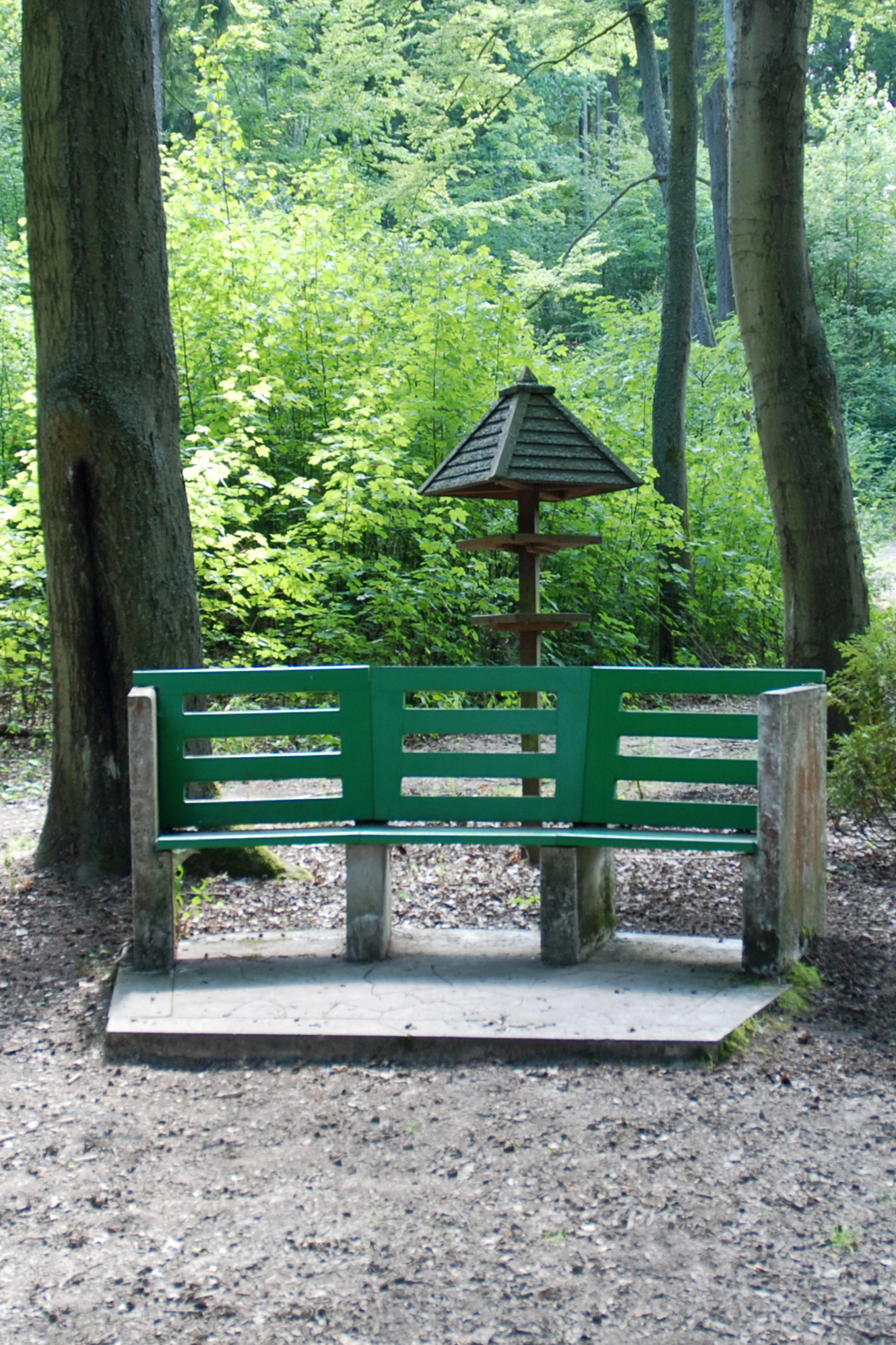 "Lavička U Křížku" na rozcestí "U Křížku" v karlovarských lázeňských lesích